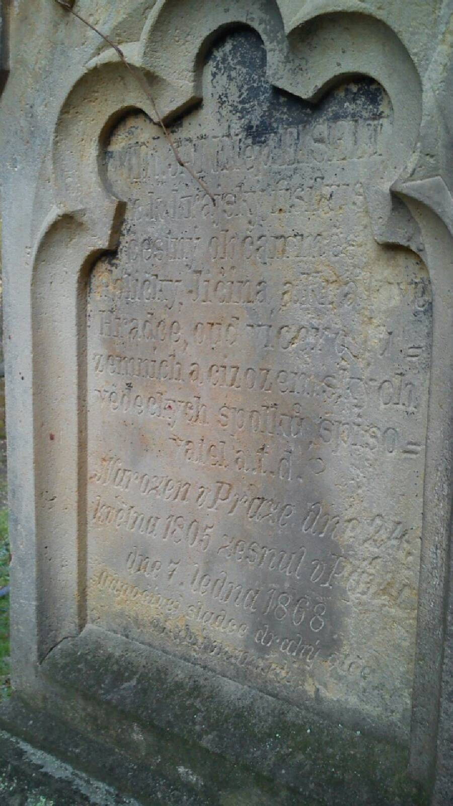 Náhrobek Jana Nepomuka Eiselta na hřbitově Zámeček v Novém Hradci Králové